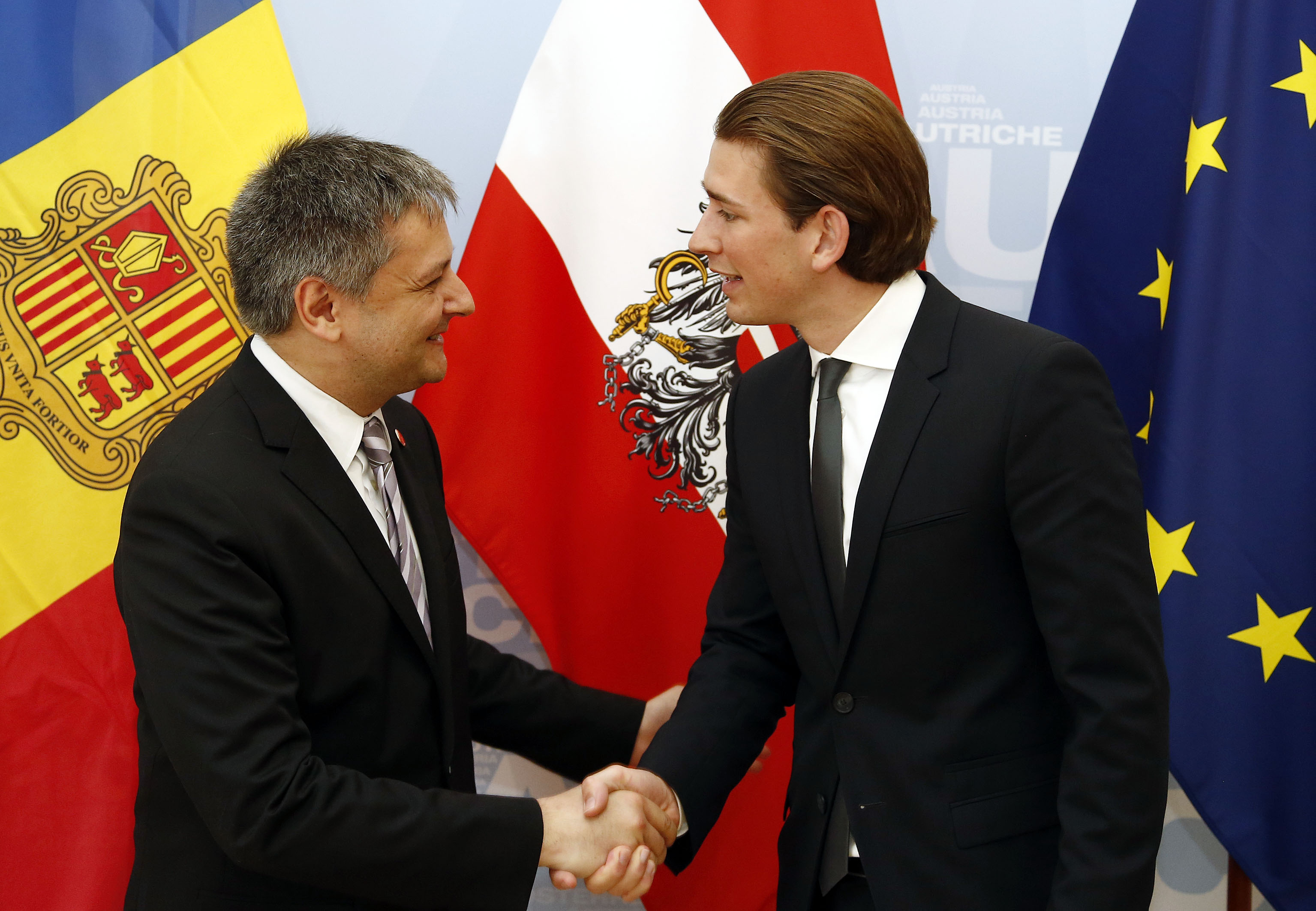 Ministerkomitee des Europarates. Außenminister Sebastian Kurz trifft den Außenminister von Andorra Gilbert Saboya Sunye. 05.05.2014, Foto: Dragan Tatic